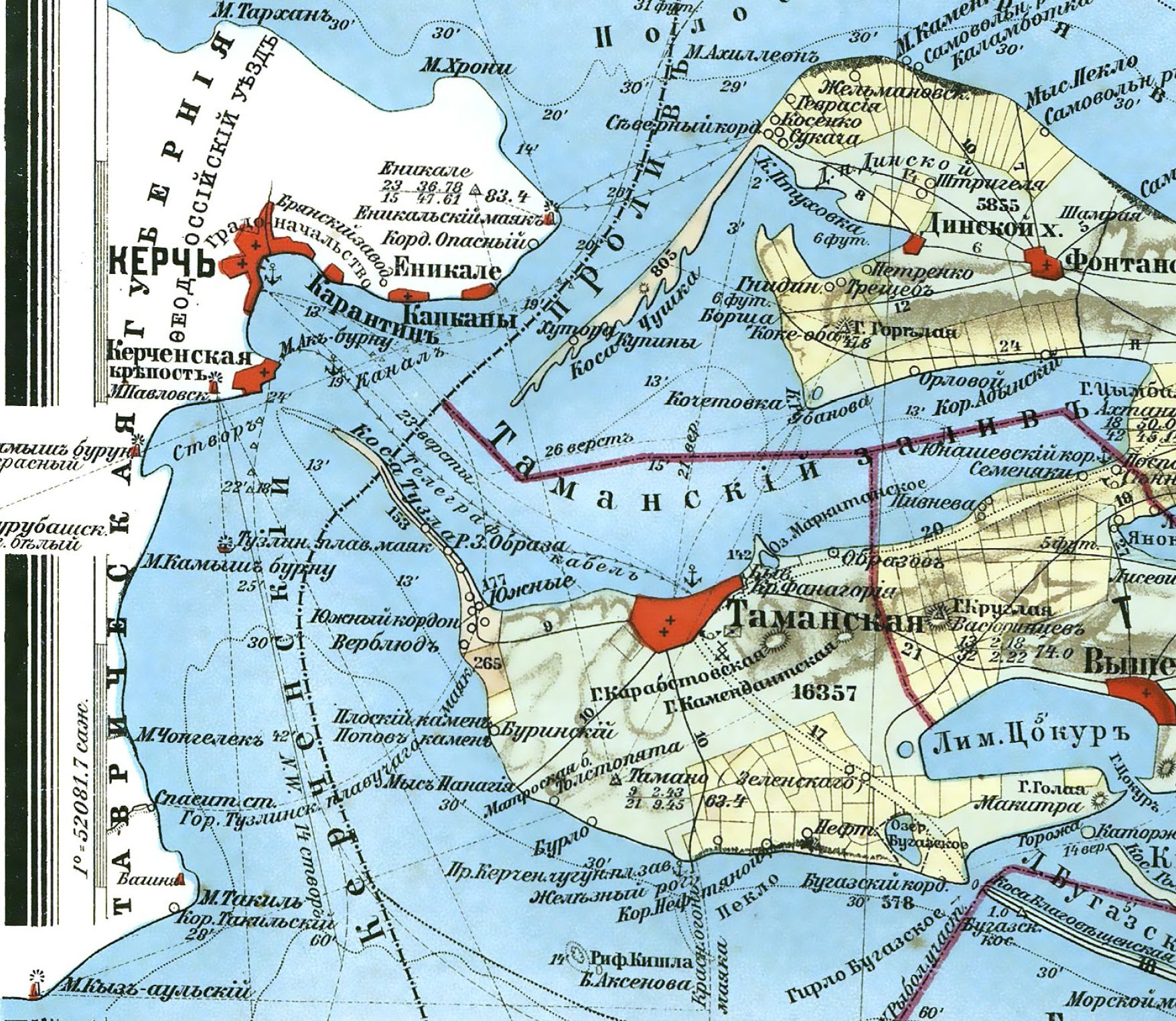 Карта Кубанской области и близких к ней Черноморской губернии и части Сухумского округа, 1902 год (фрагмент)